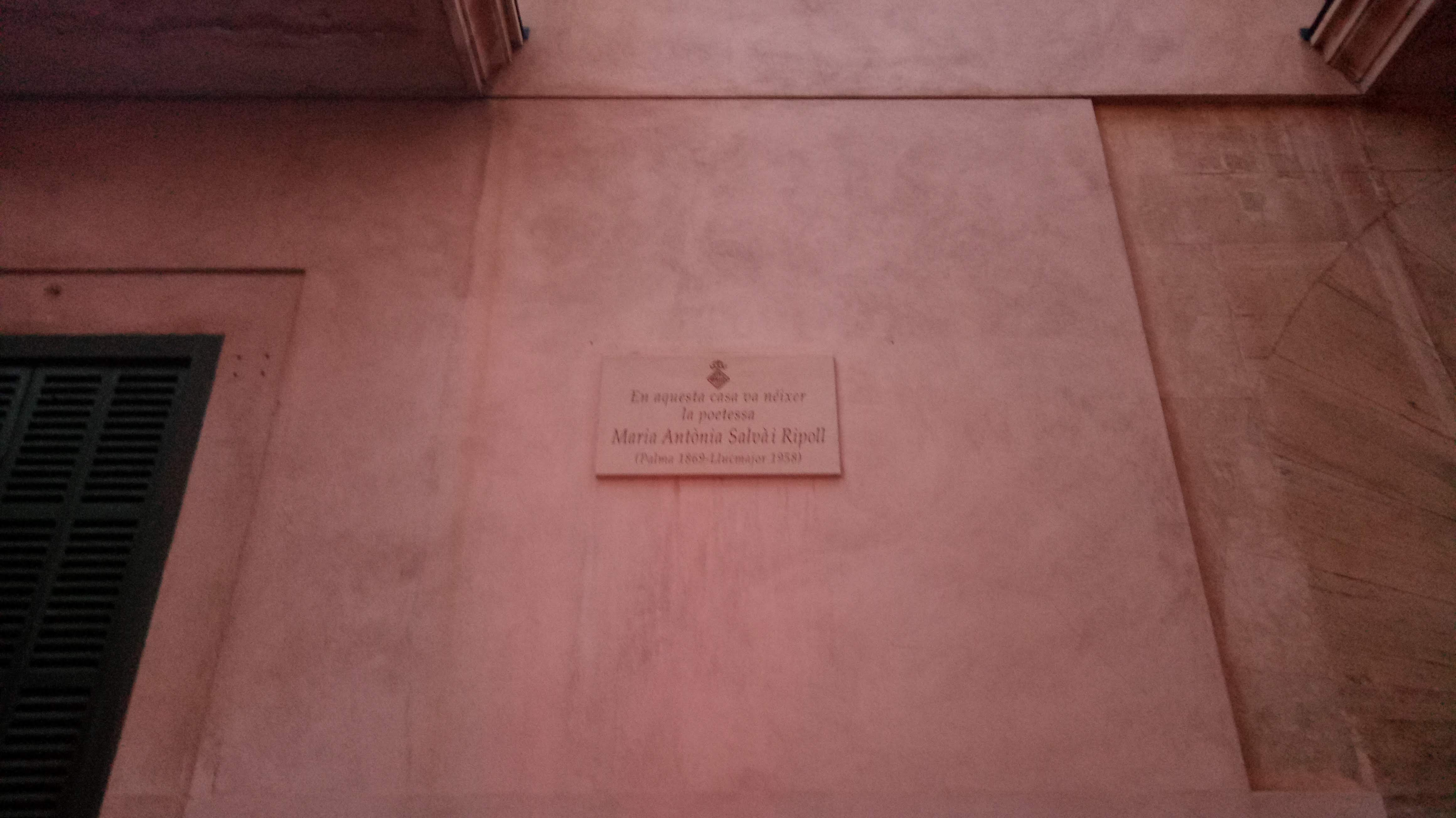 Aquesta placa recorda el lloc on va néixer Maria Antònia Salvà. Es troba a la façana de la casa, al carrer d'en Morei, al cap de cantó de ponent que forma amb els carrers de Miramar i de la Portella. Diu així: «En aquesta casa va néixer Maria Antònia Salvà i Ripoll (Palma 1869 - Llucmajor 1958)»